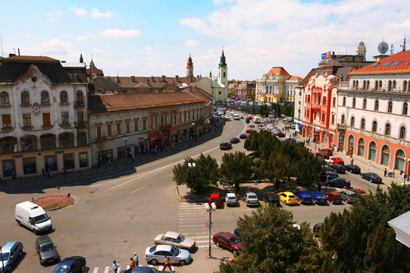 Piaţa Ferdinand din Oradea